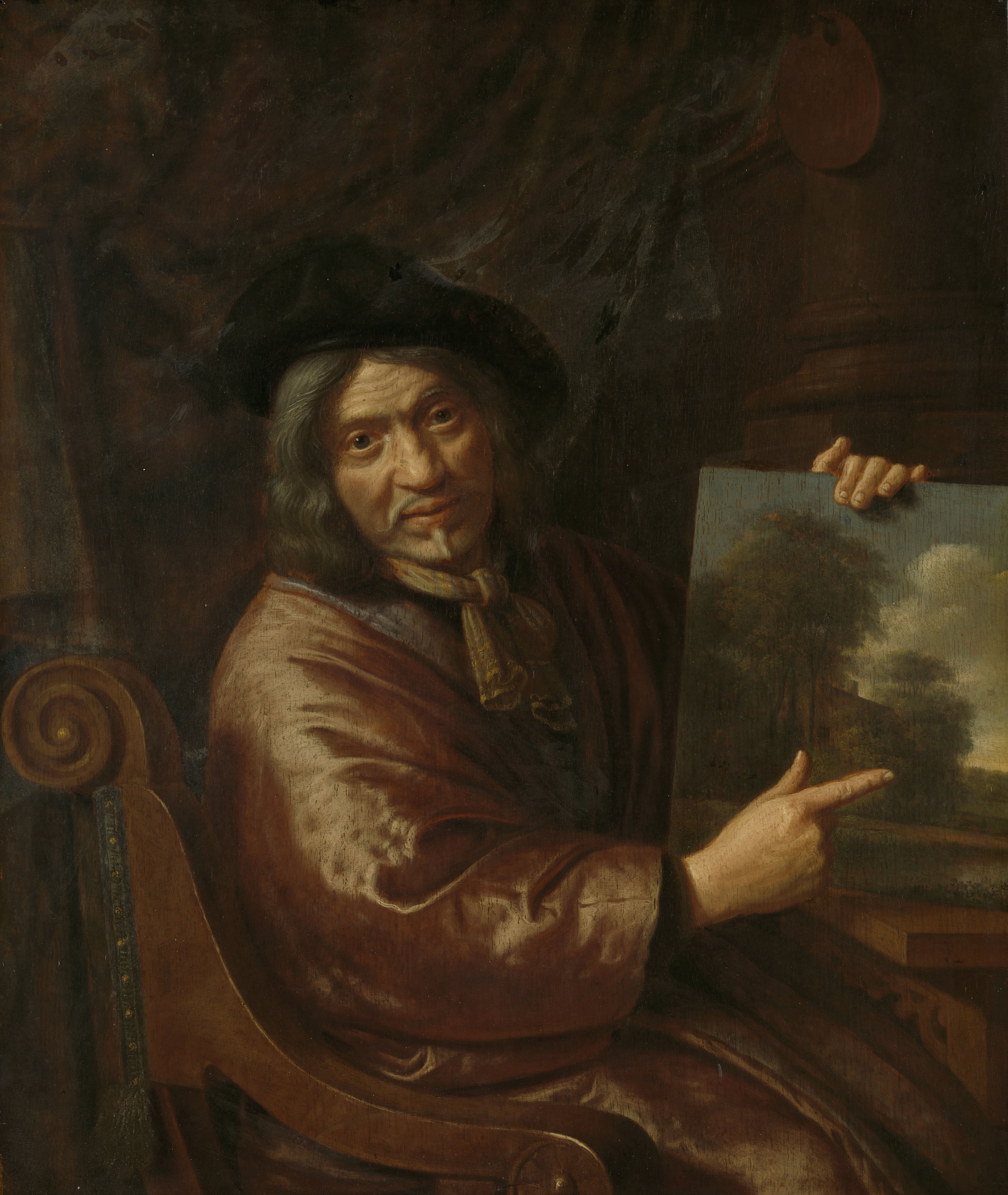 Zelfportret van de schilder Pieter Jansz. van Asch zittend in een leunstoel en wijzend op een schilderij dat hij op de tafel voor hem houdt.